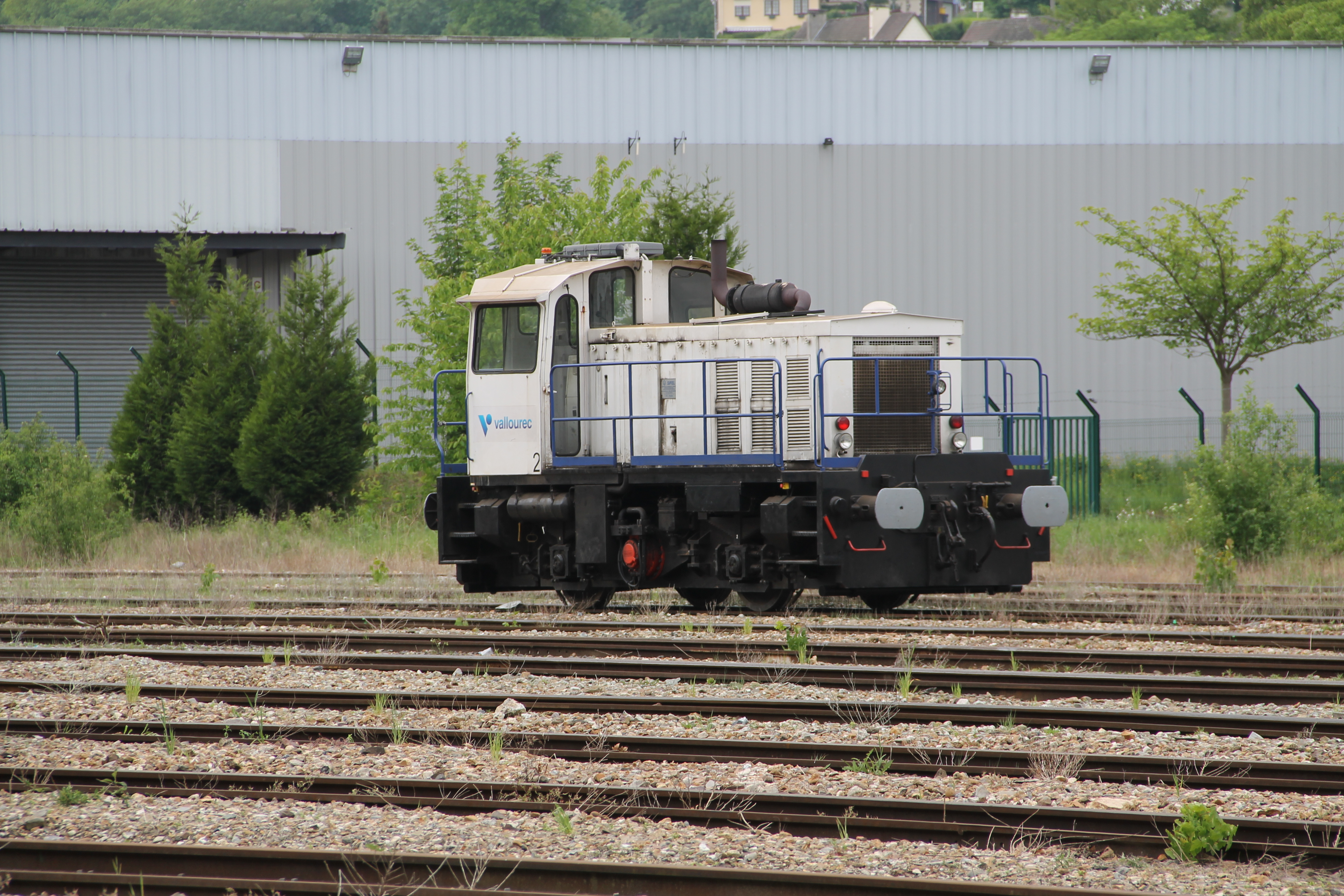 Locotracteur Vallourec au triage de l'Ouest sur la rive droite du port de Rouen